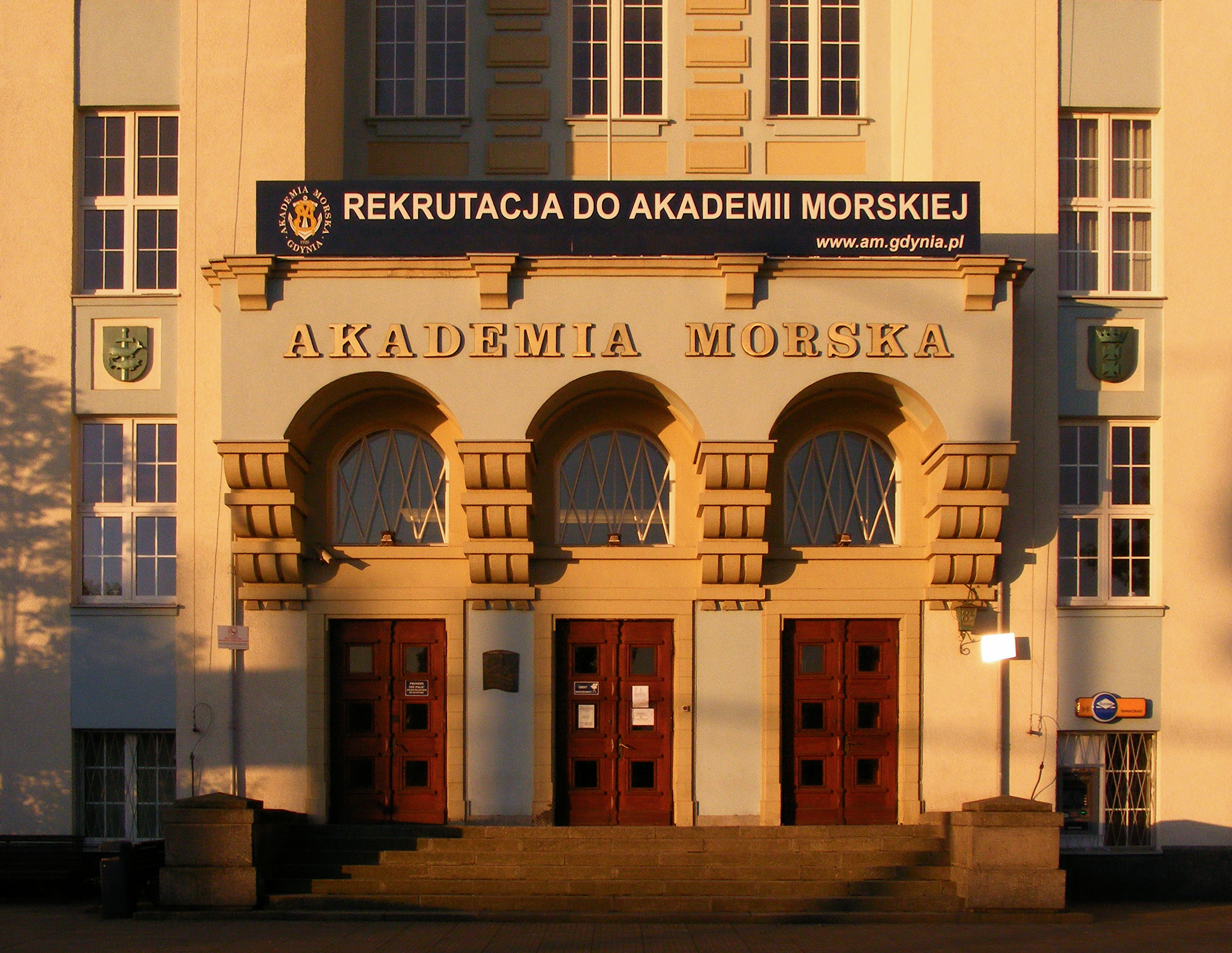 Budynek główny Akademii Morskiej (dawniej Wyższej Szkoły Morskiej) przy ul. Morskiej 83.